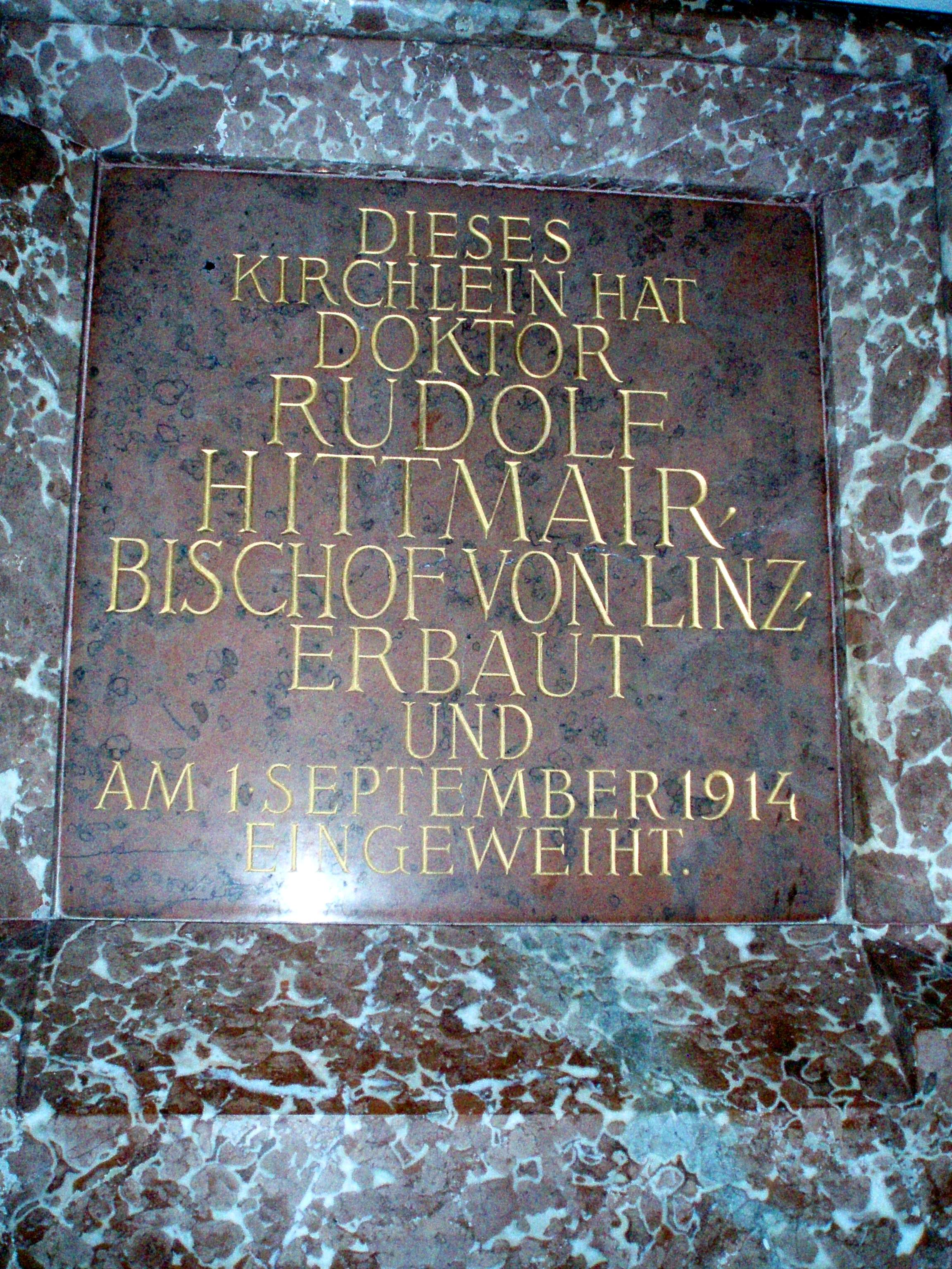 Gedenktafel für Bischof Hittmair in der Dachsteinkapelle nahe der Simonyhütte, aus dem Jahr 1925.